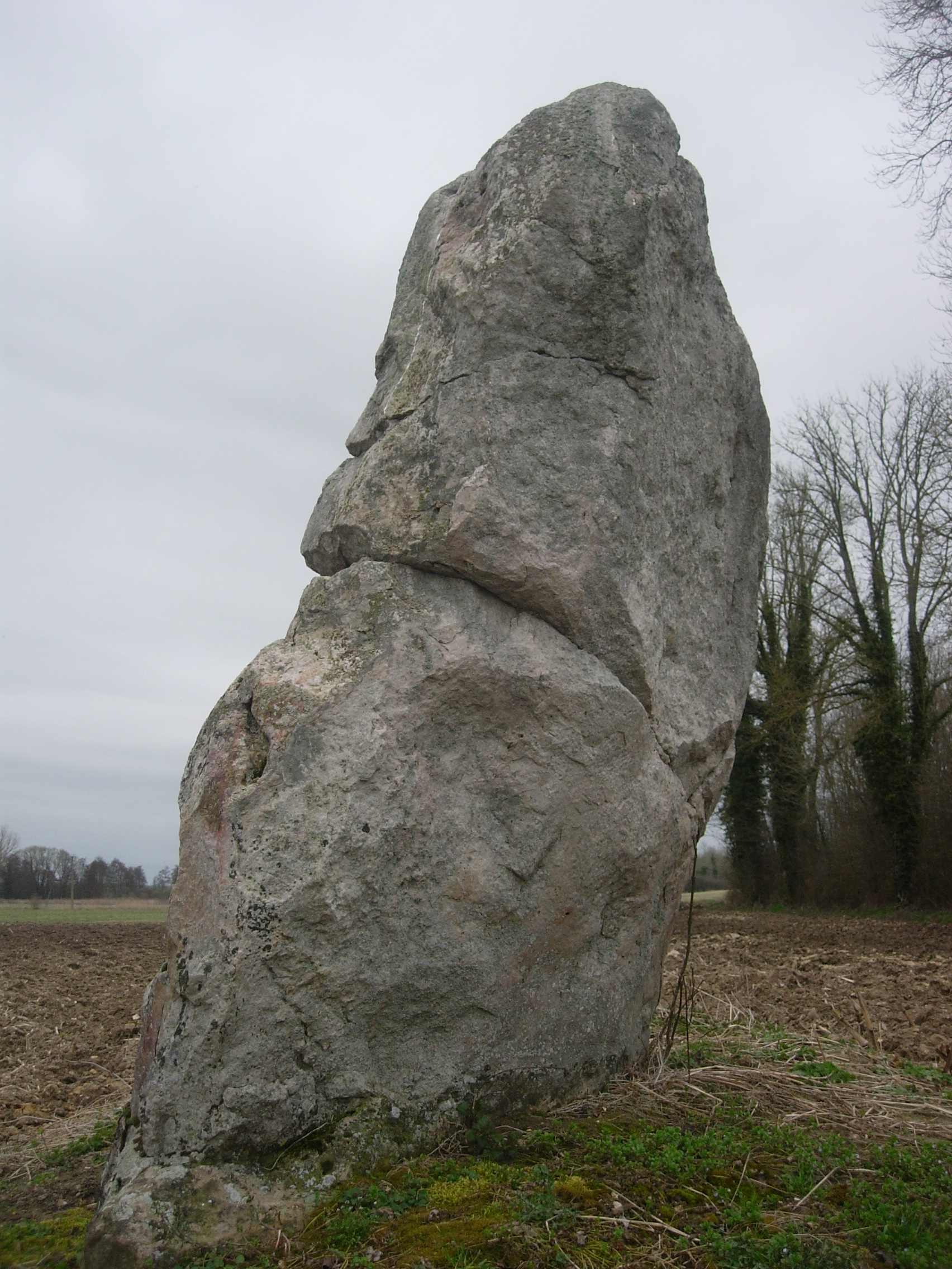 Menhir de la Pierre au coq à Souligny-les-étangs (Aube)